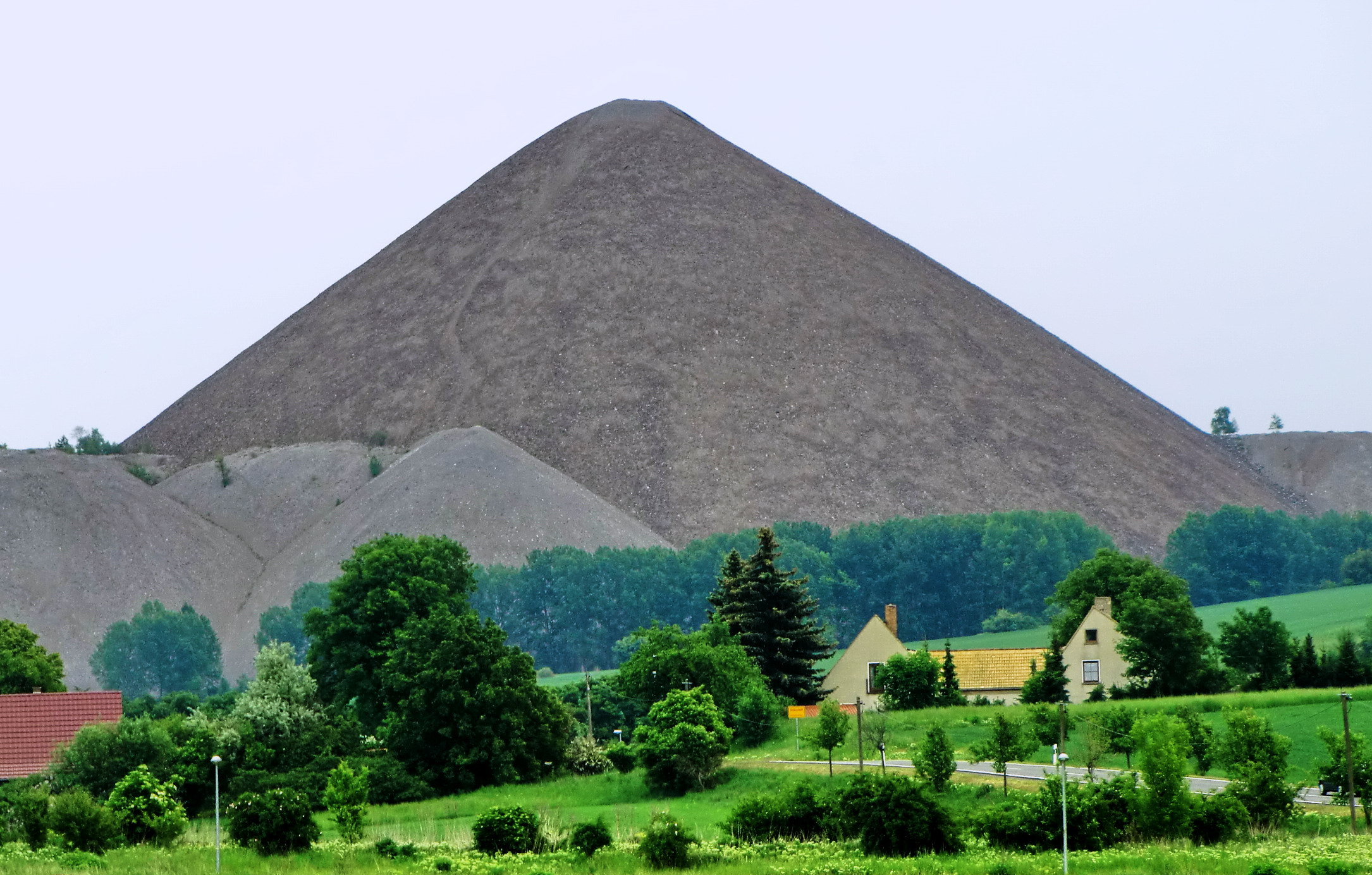 Abraumhalde des Kupferbergbaus bei Volkstedt